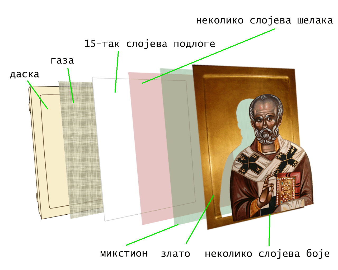 Srpskohrvatski / српскохрватски: Slojevi ikone